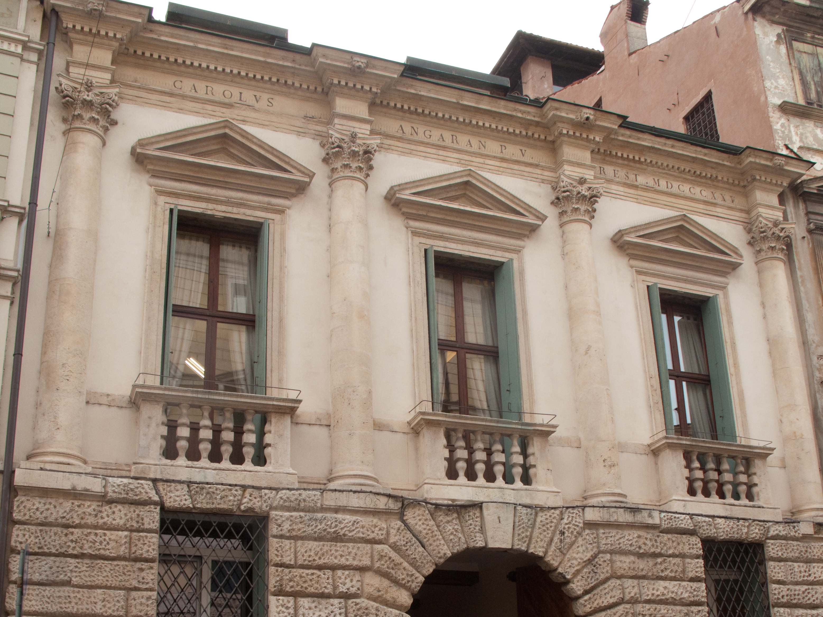 Vicenza Palazzo Schio